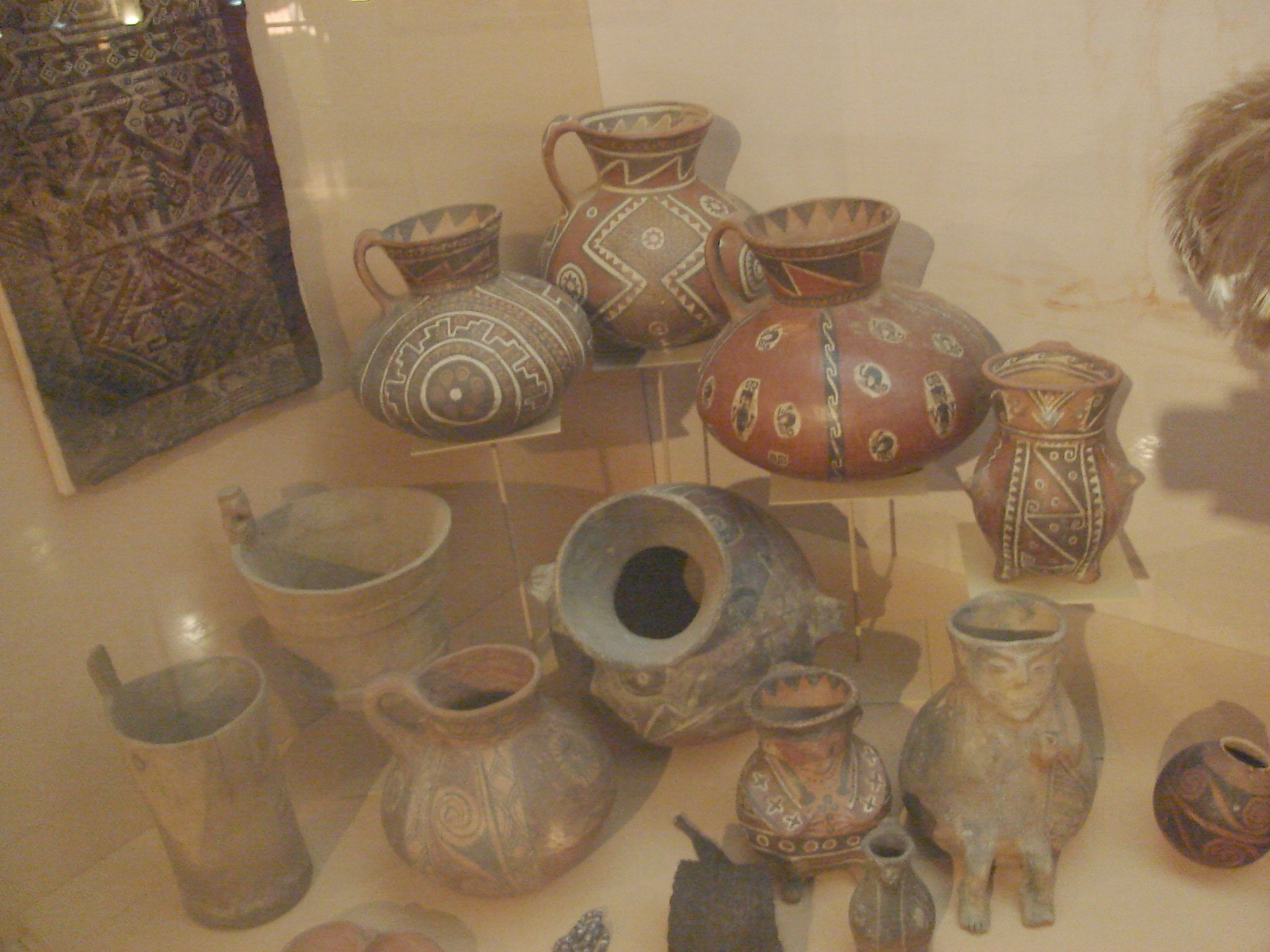 Foto tirada por mim, em Arica.